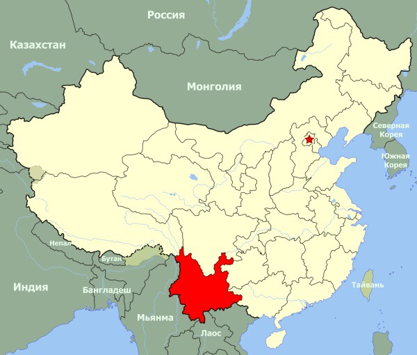 Юньнань на карте Китая